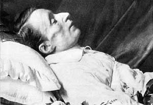 Leopardi morto - peinture - 1837